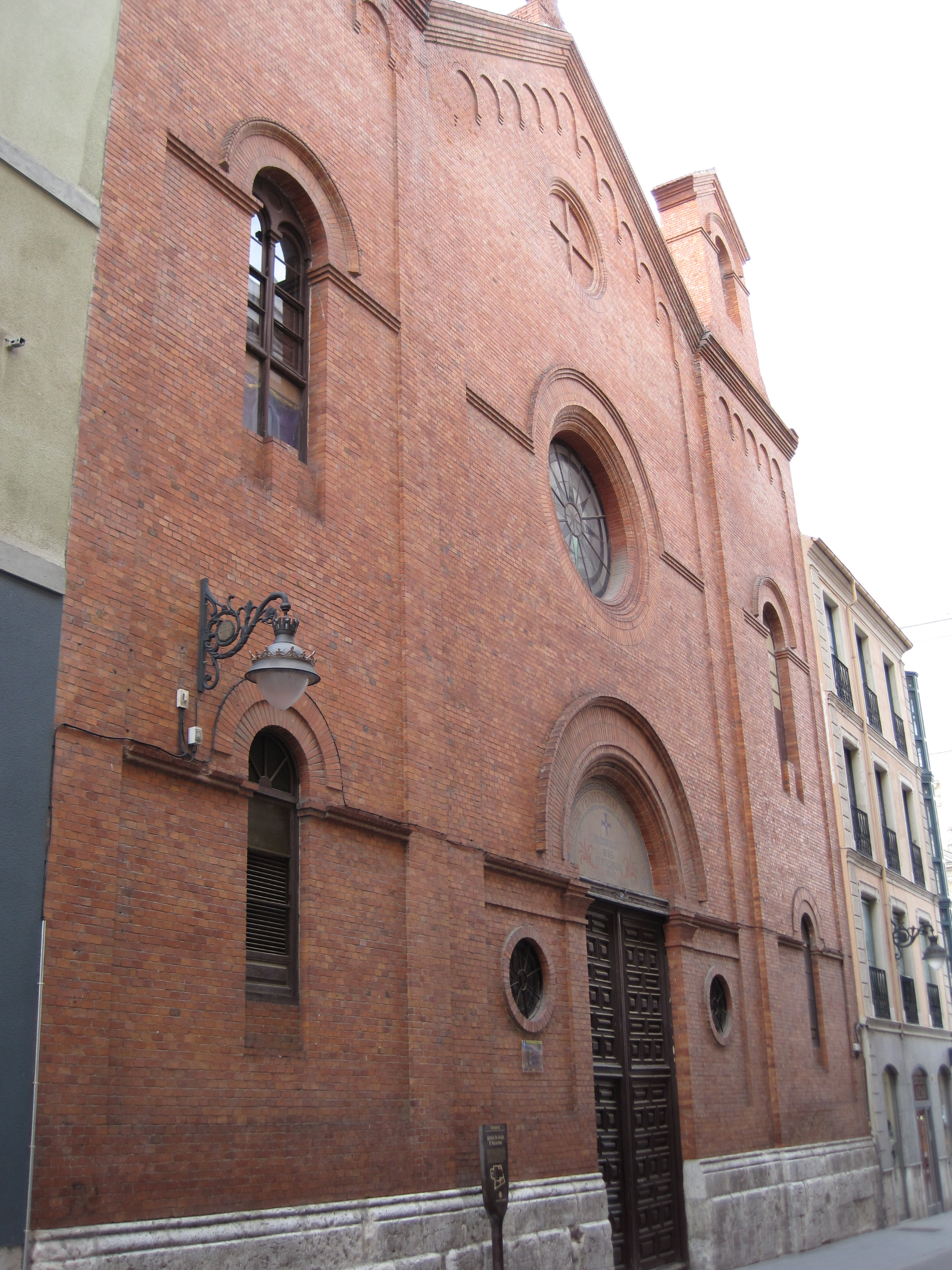 Iglesia penitencial de Nuestro Padre Jesús Nazareno, Valladolid (España).